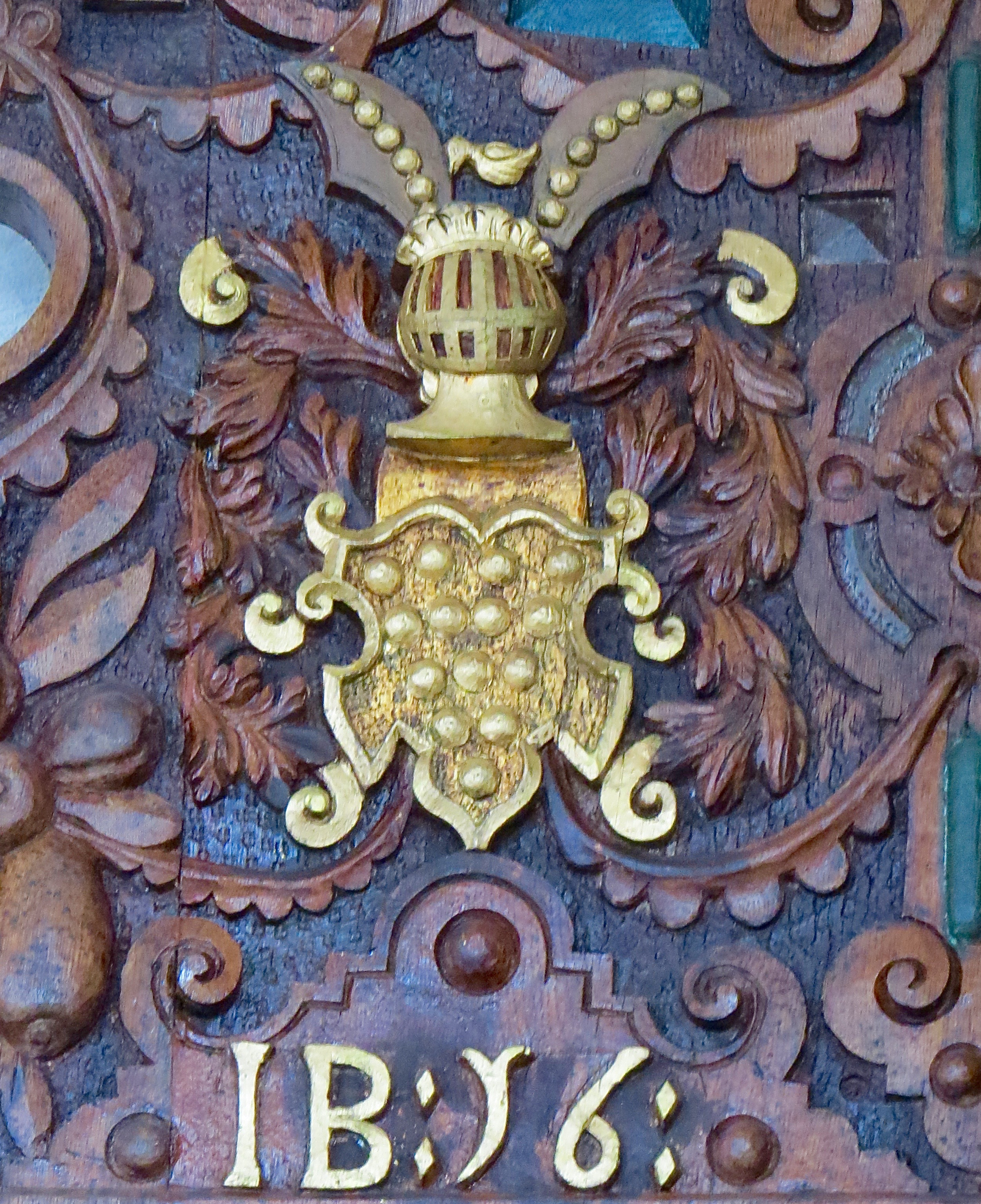 Lensmand Ioachim Bülows våben på altertavle i Skibby Kirke, Horns Herred, Sjælland